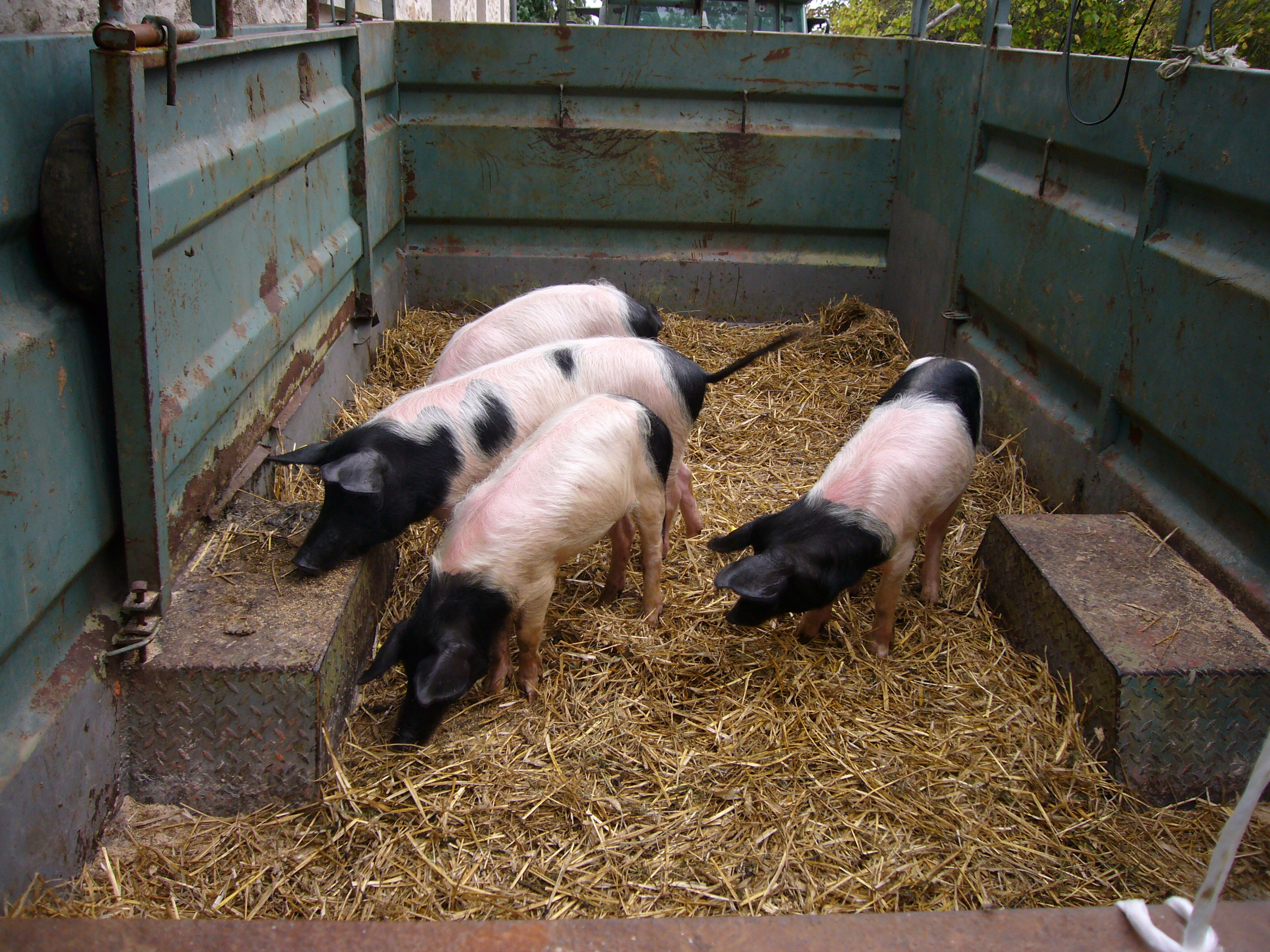 Cul noir limousin (race porcine) (Veyrac, 87, France)